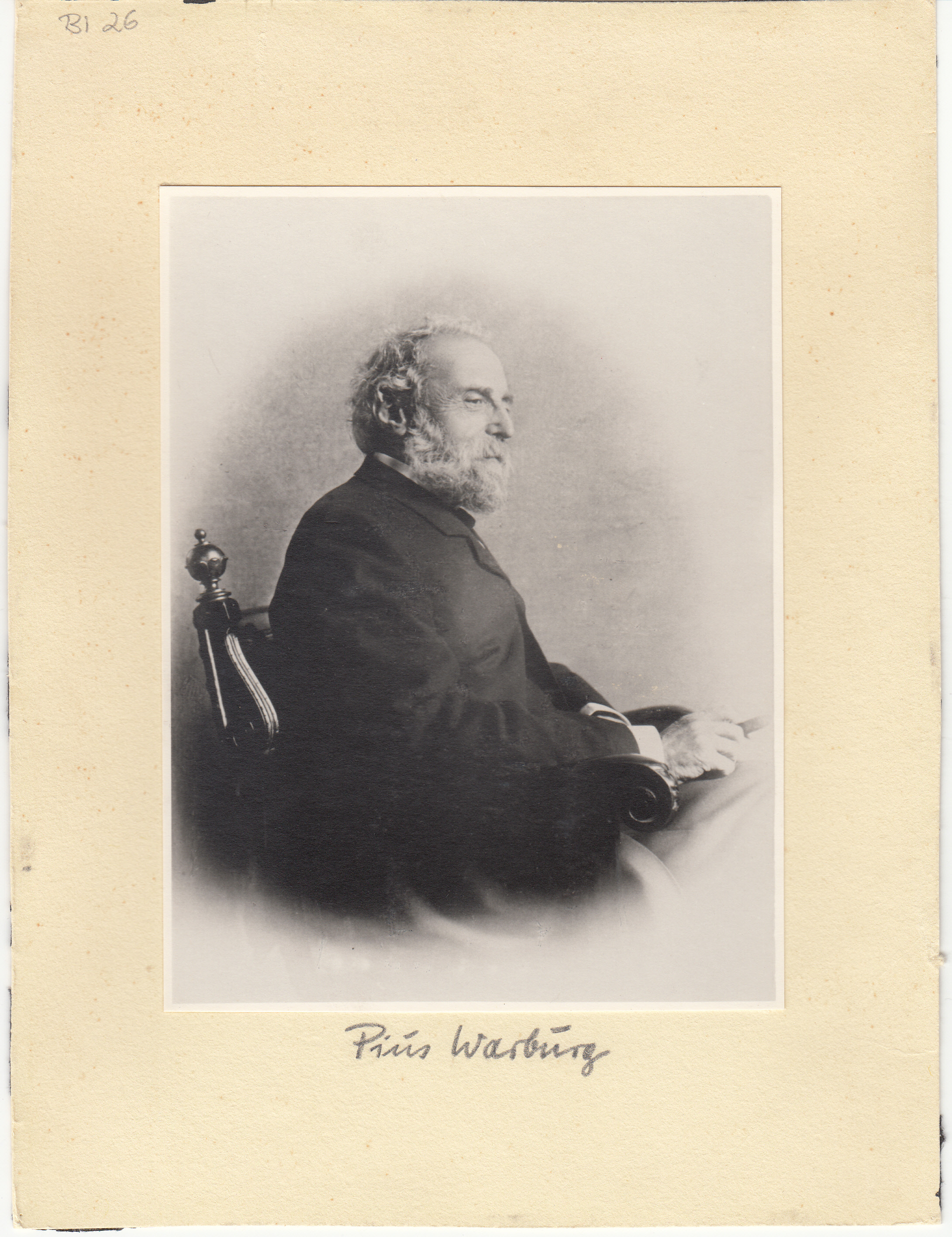 Fotoreproduktion von Pius Warburg